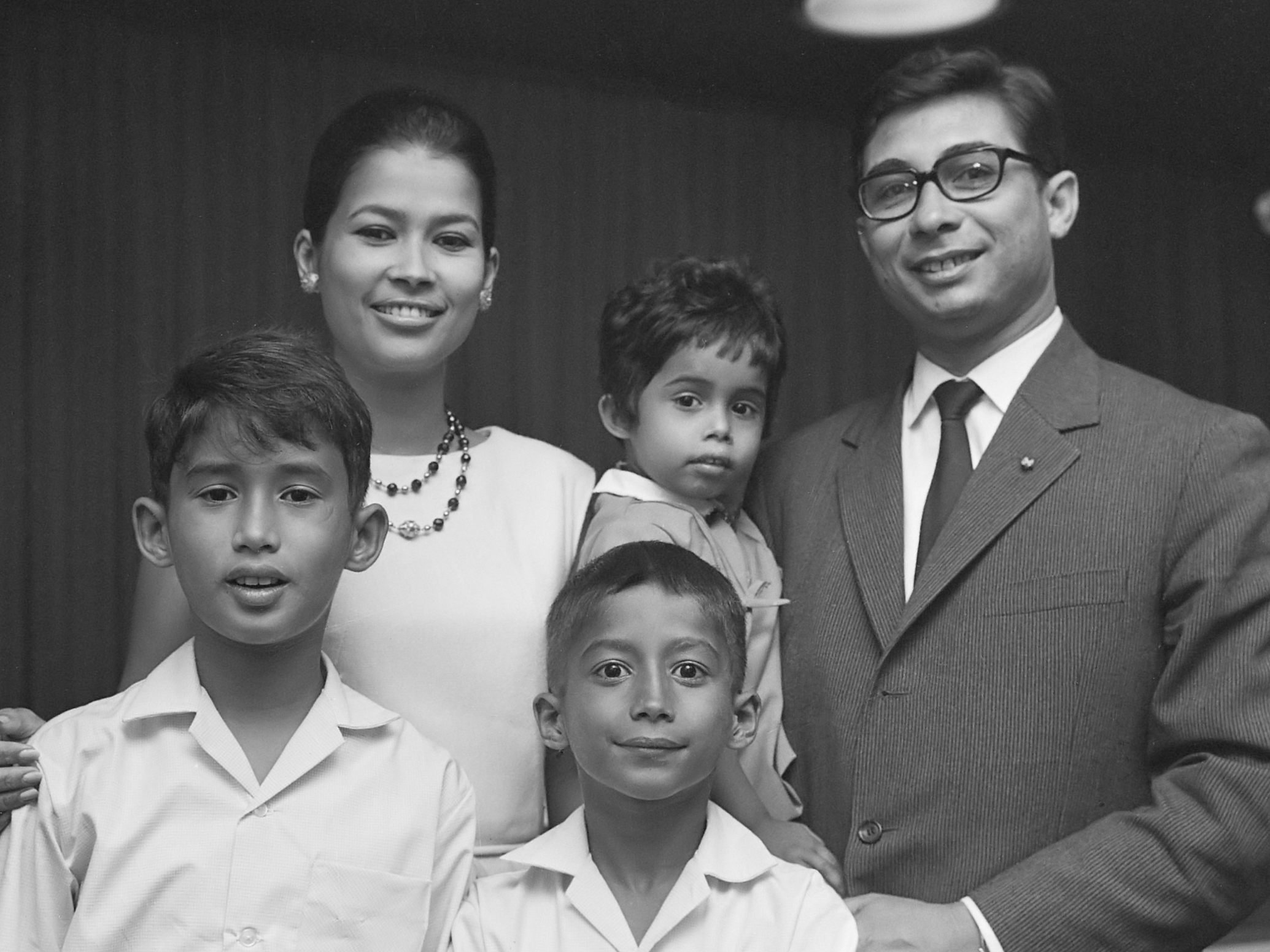 Aankomst echtgenote en kinderen van gevolmachtigd minister van Suriname Lim a Po op Schiphol 18 juli 1968